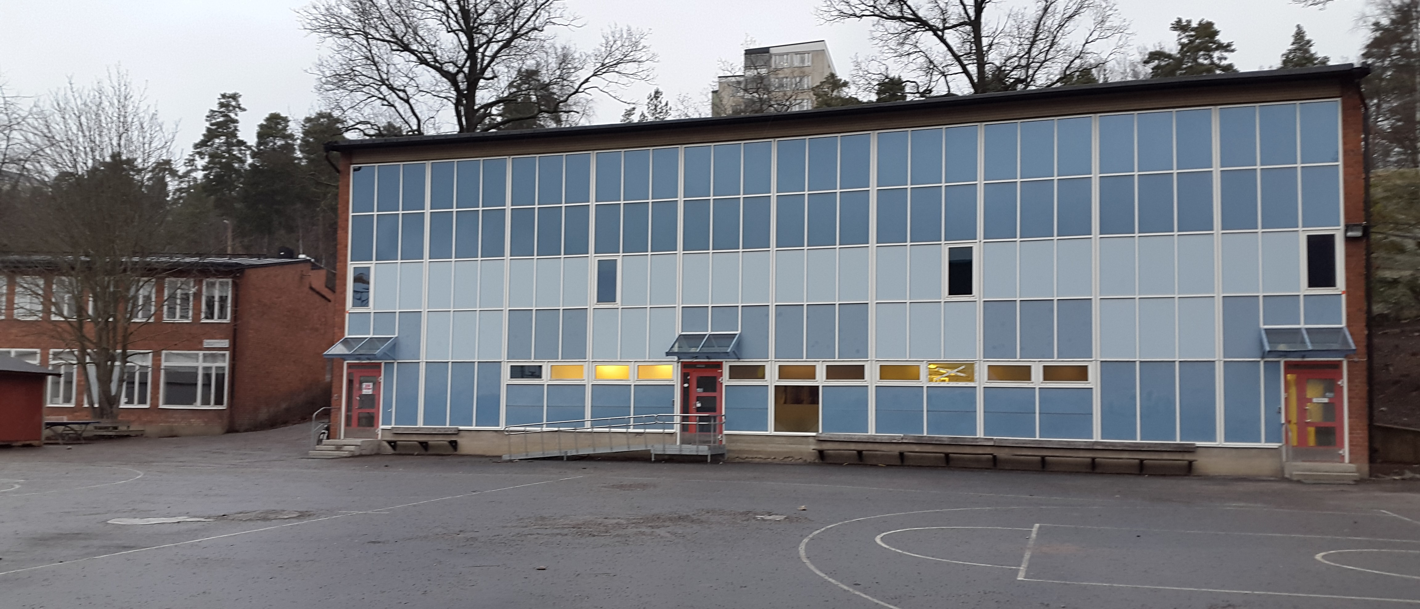 Gymnastikhallen vid Mörbyskolan, Danderyd, tidigare Mörby läroverk, mars 2016